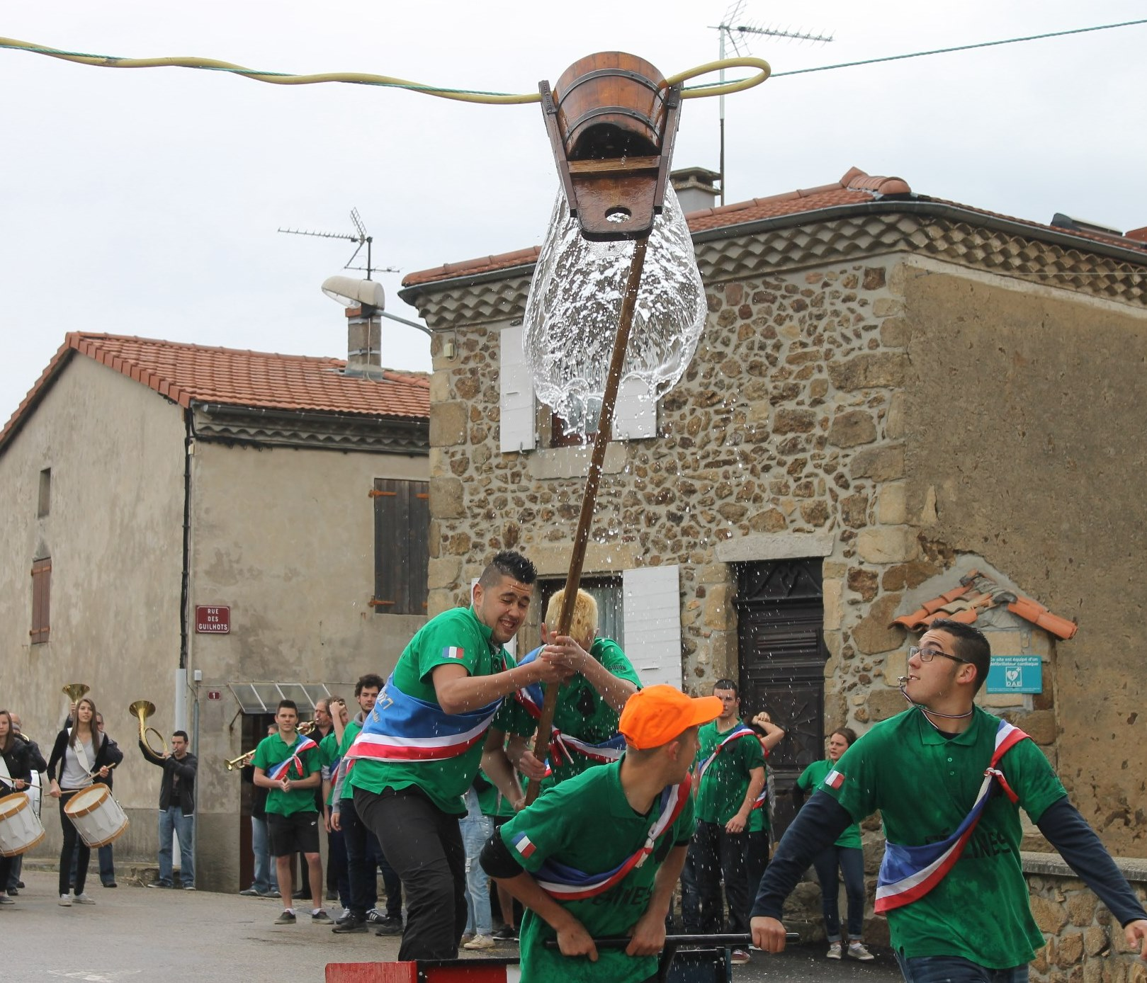 Félines détail